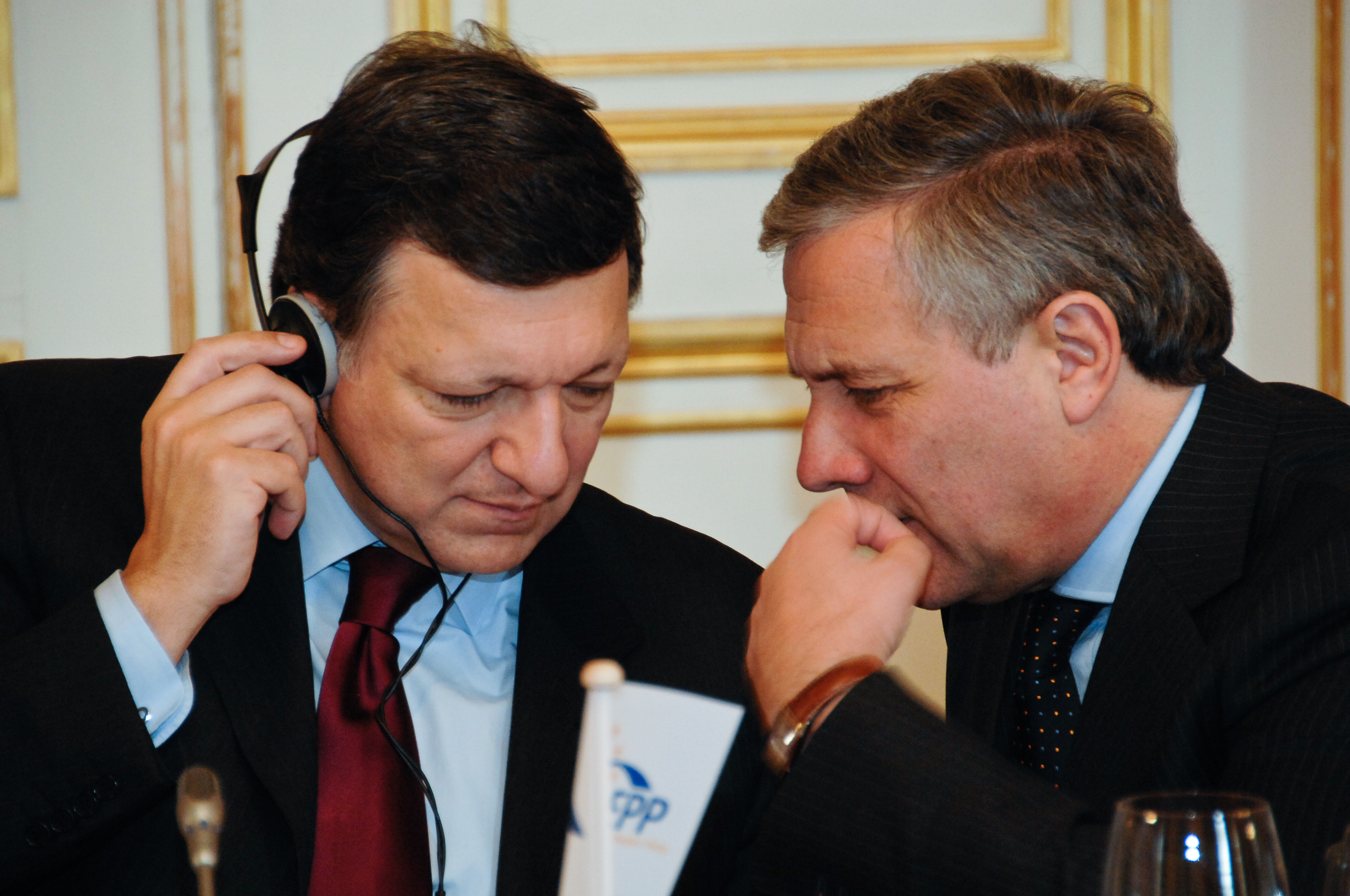 EPP Summit 11 December 2008